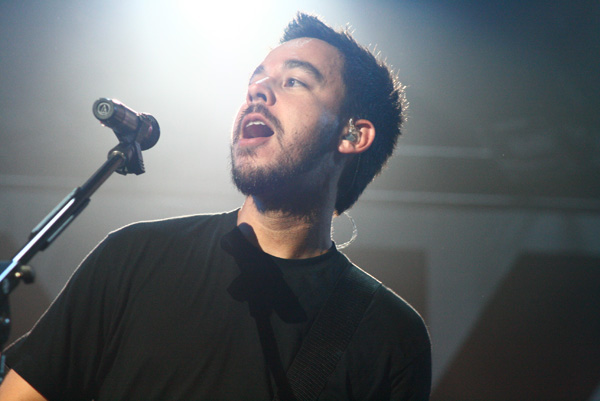 Mika Shinoda